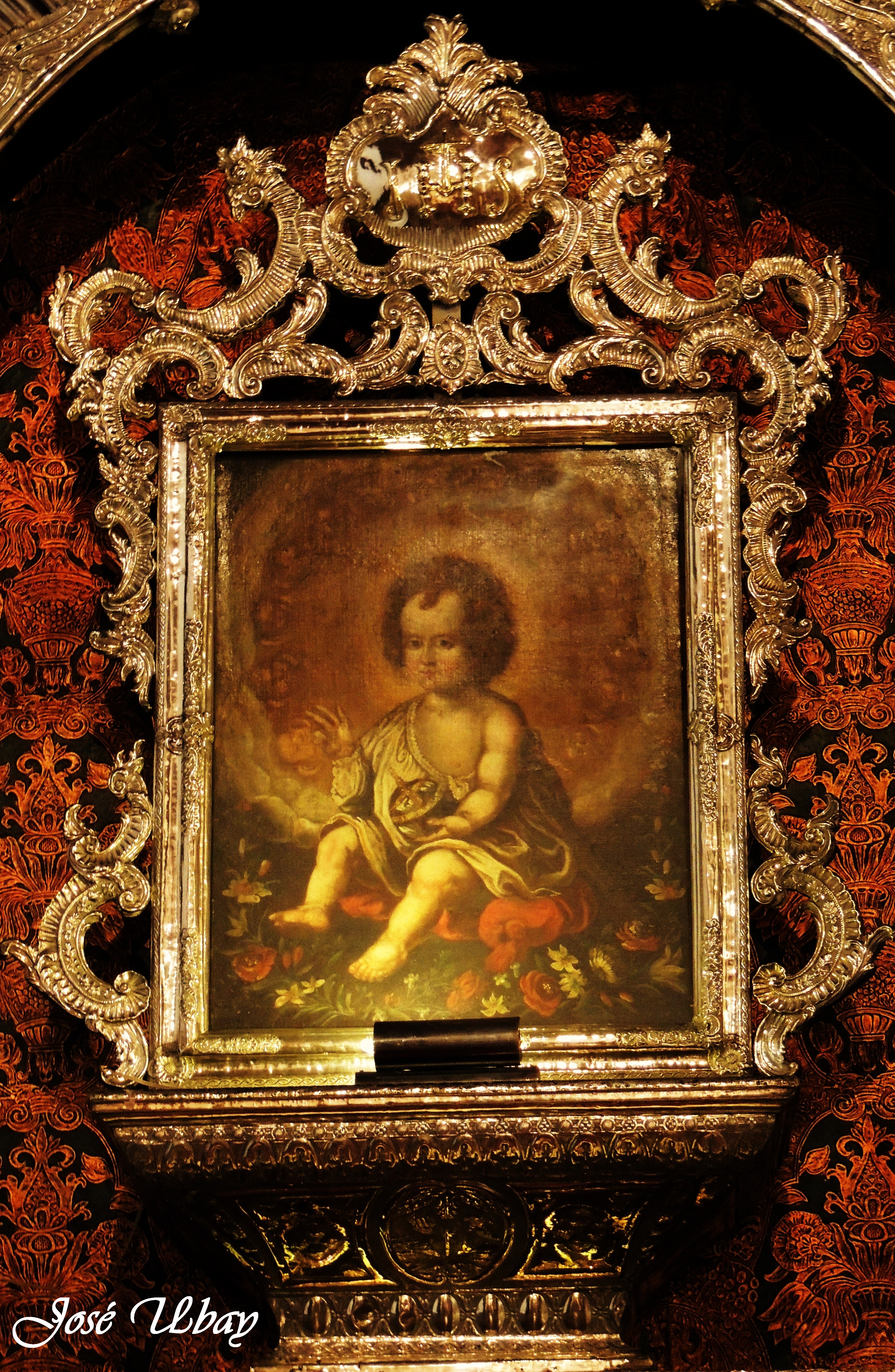 Niño Jesús Enfermero. (siglo XVII) Anónimo. Parroquia de San Francisco de Asís - Las Palmas de Gran Canaria.